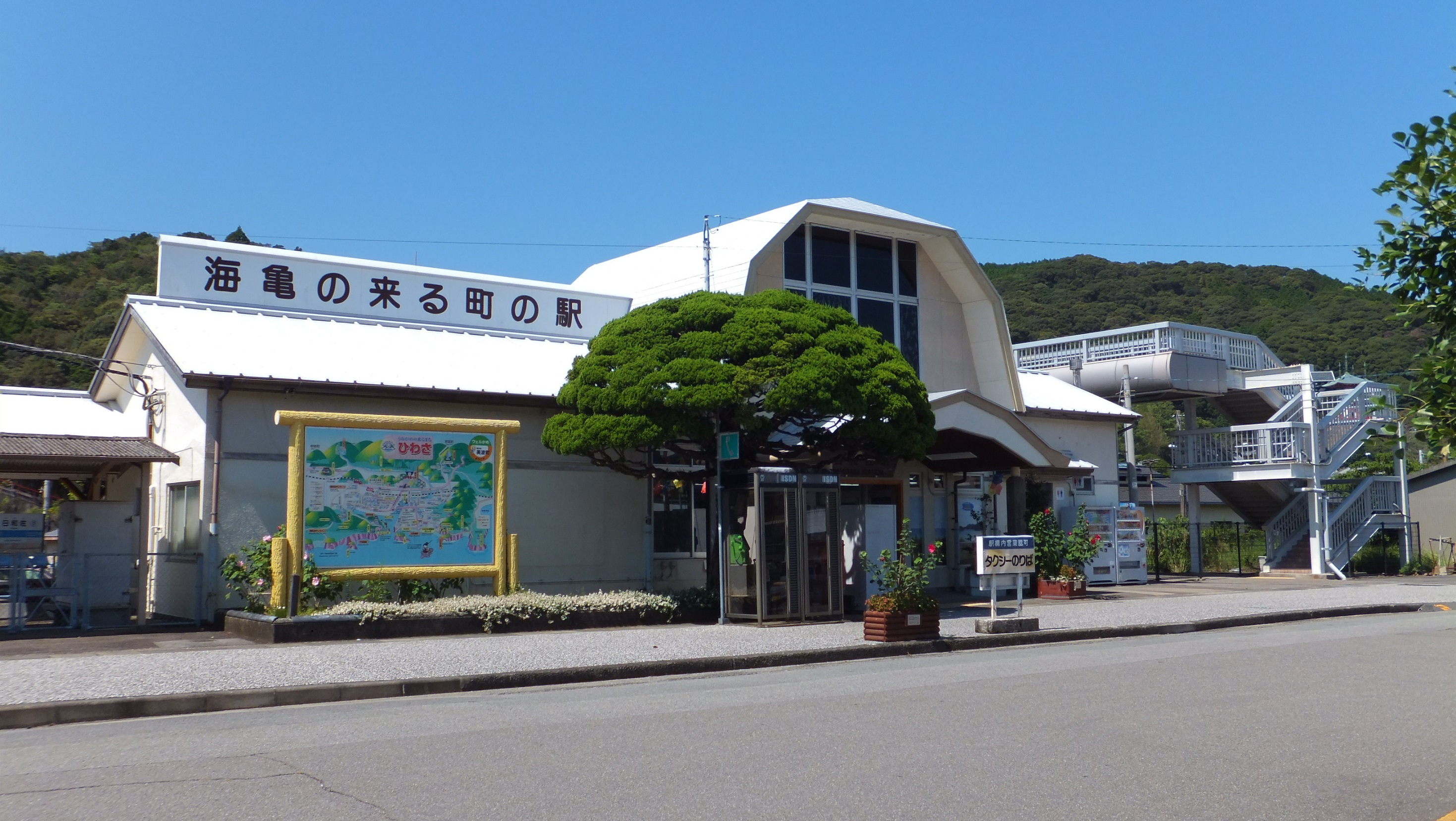 JR四国 牟岐線 日和佐駅 （徳島県海部郡美波町 2015年9月）